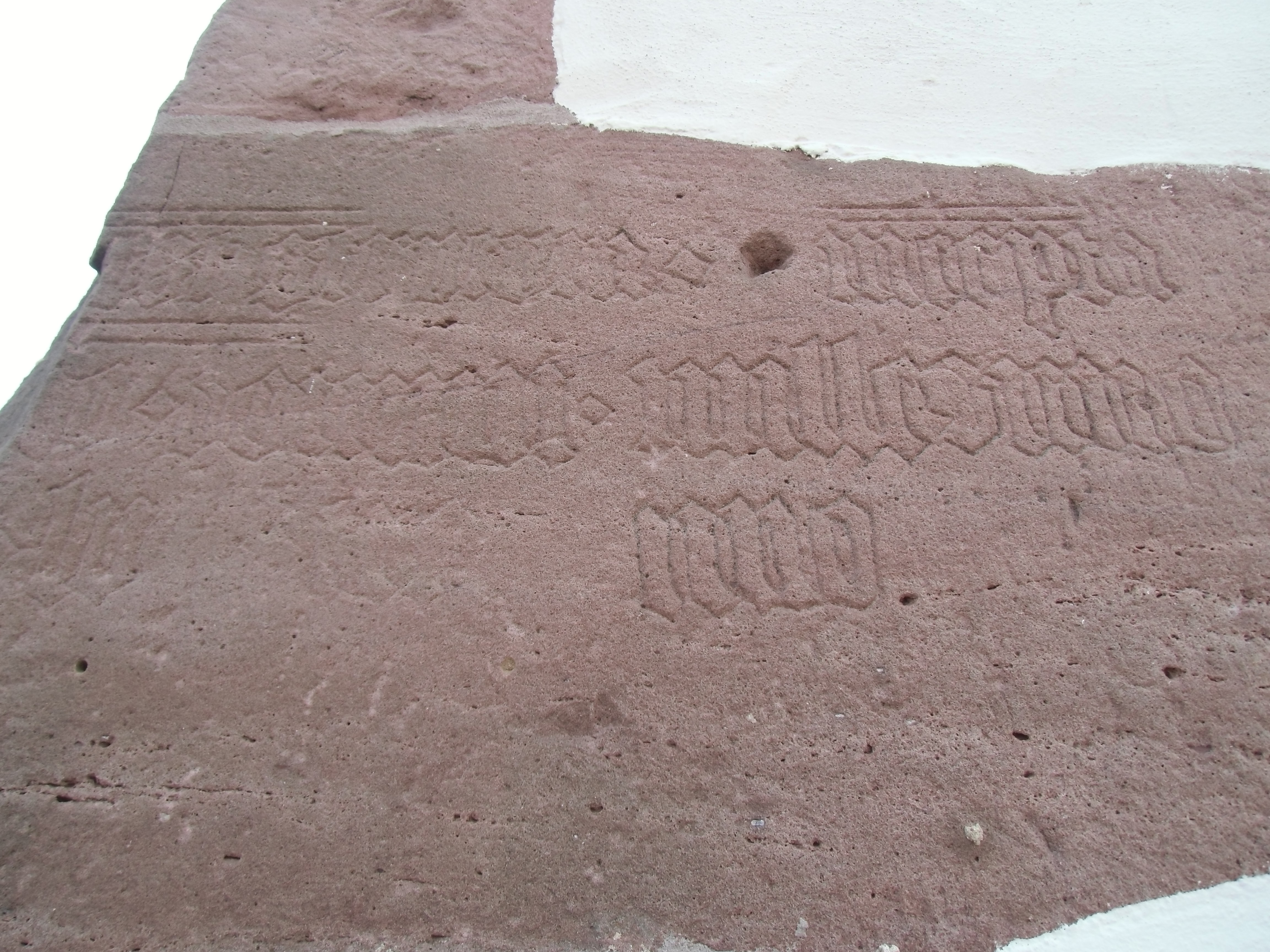 Gotische Inschrift am Turm der Evang. Kirche in Ebhausen